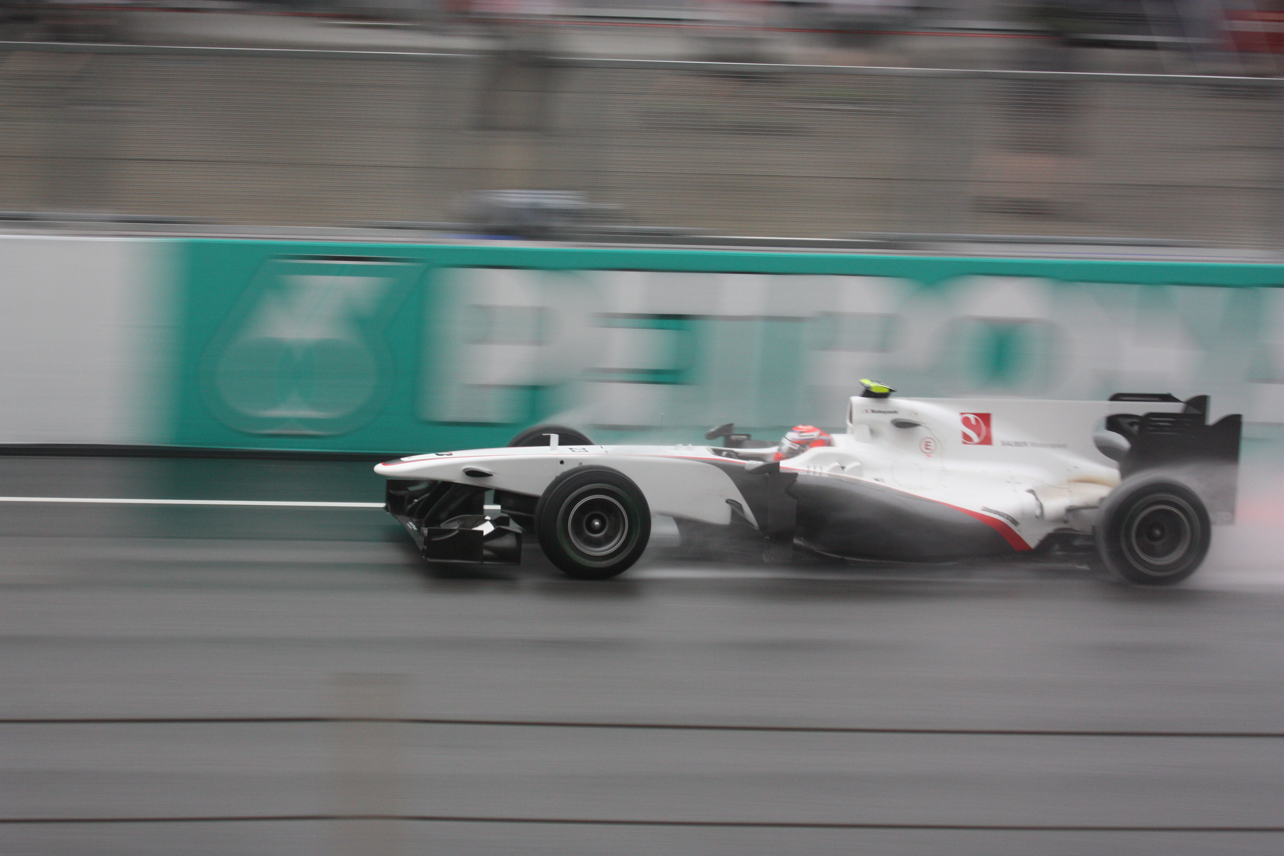 Kobayashi qualy 2010